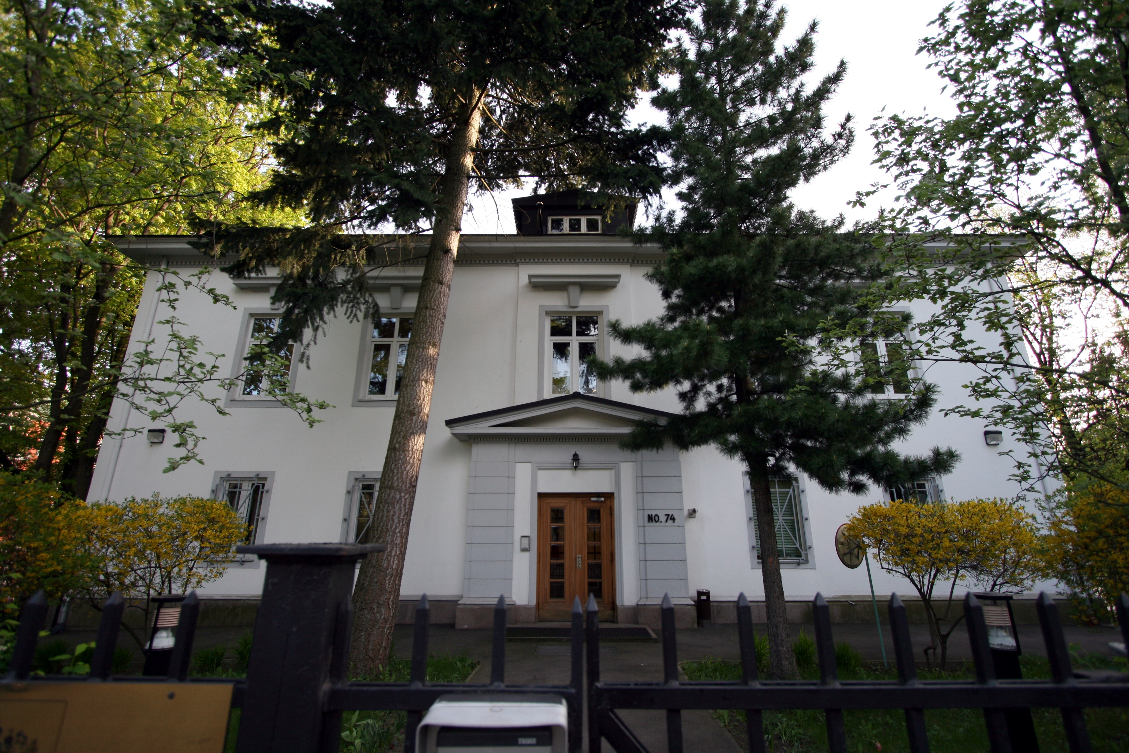 L'ambassade russe d'Oslo, construite en 1926 par l'architecte Oscar Hoff.